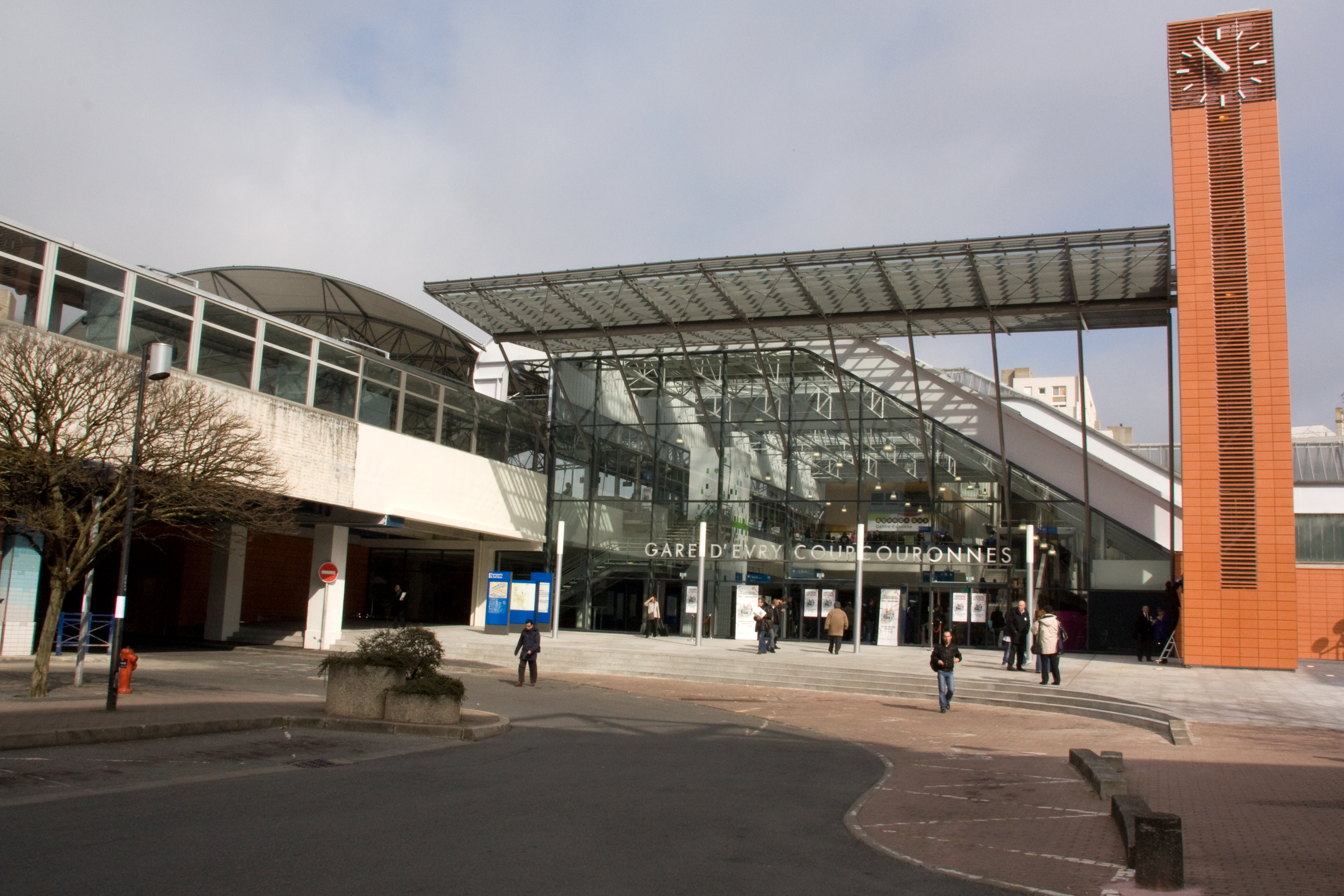 Gare d'Evry-Courcouronnes , Evry, département de l'Essonne, France